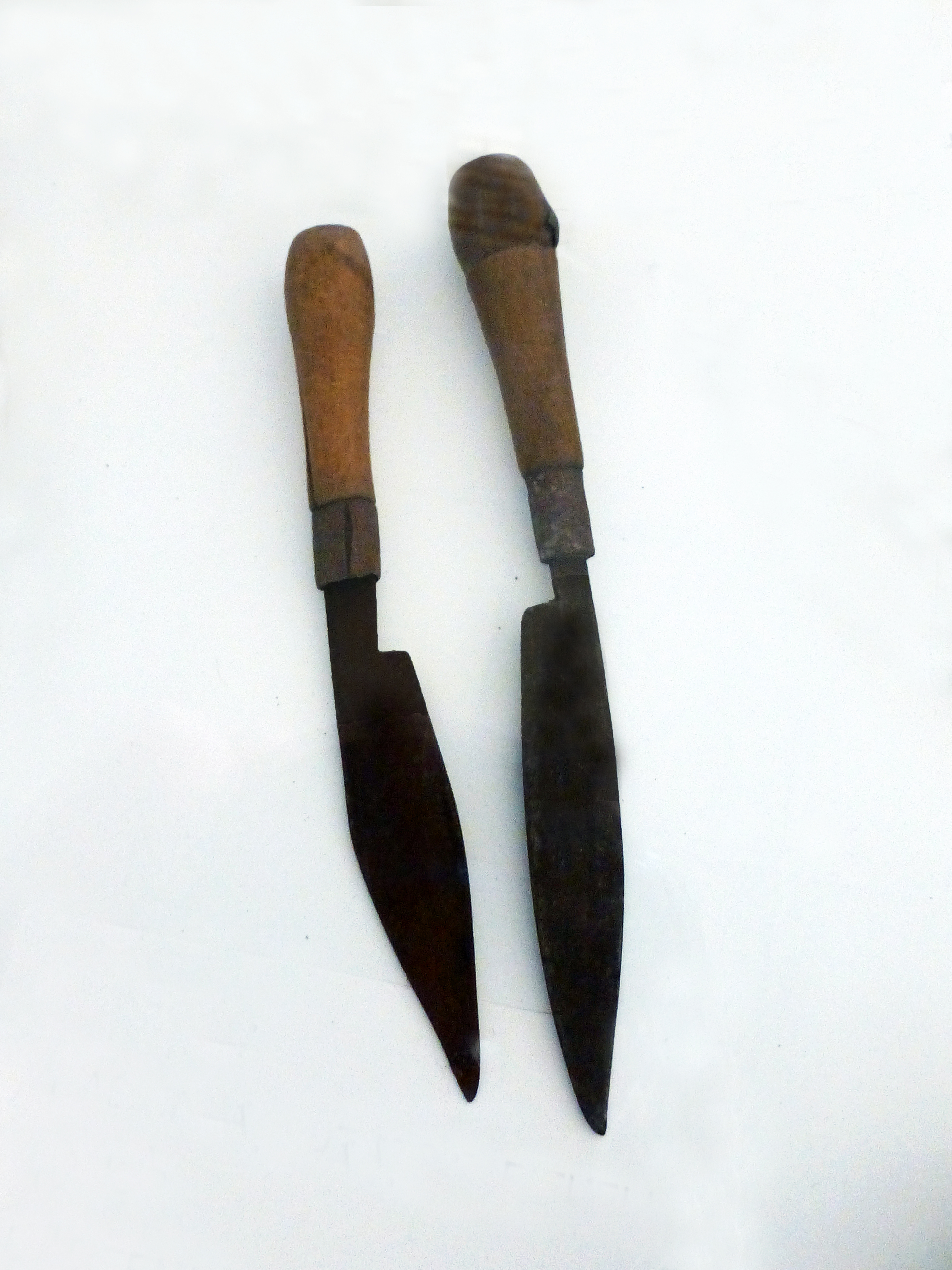 Musée africain de Gunsbach (Haut-Rhin) : tsenda (rasoir à autopsie rituelle)